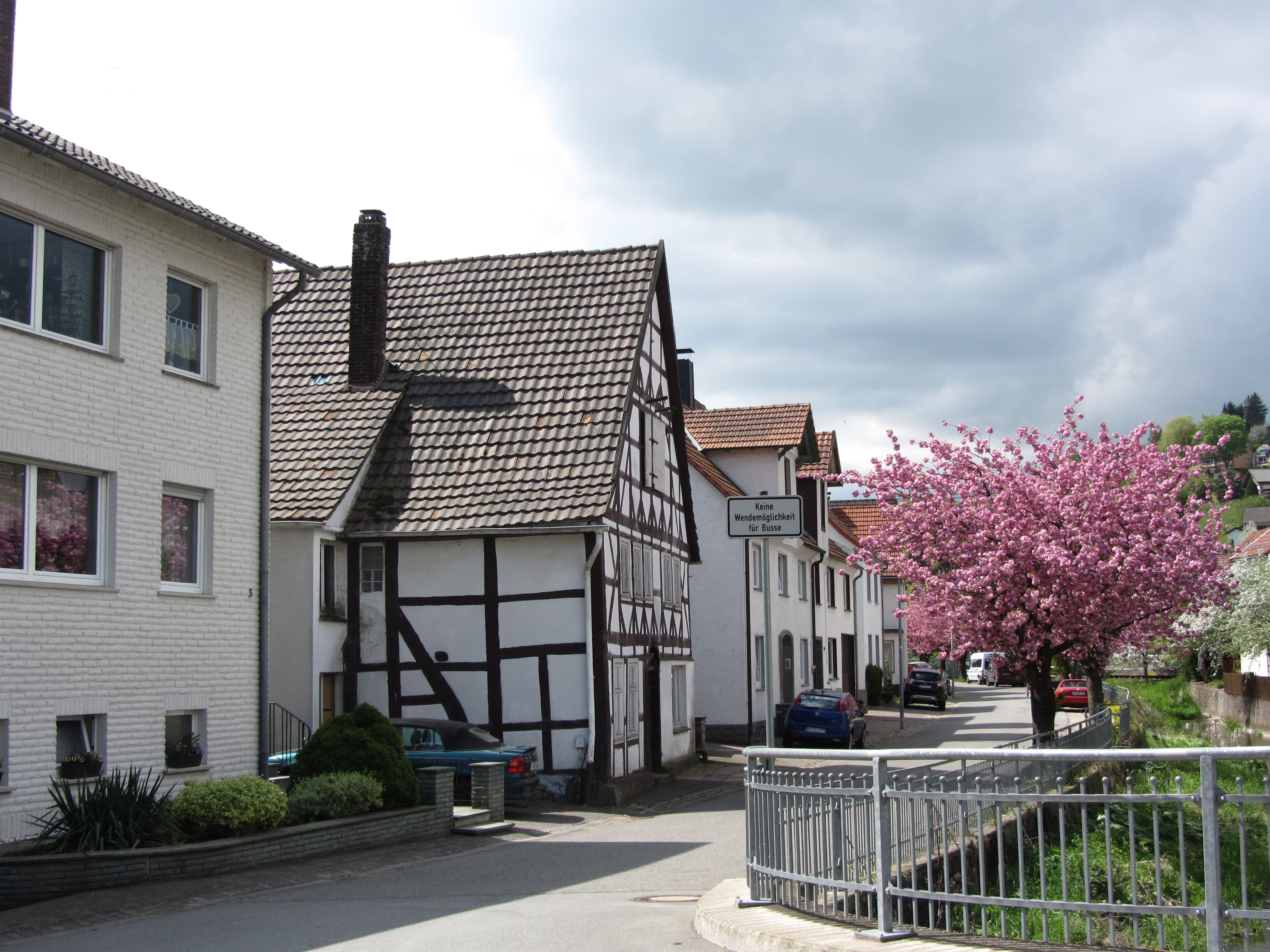 Baudenkmal Lange Reihe 5; zweigeschossiges Fachwerkhaus